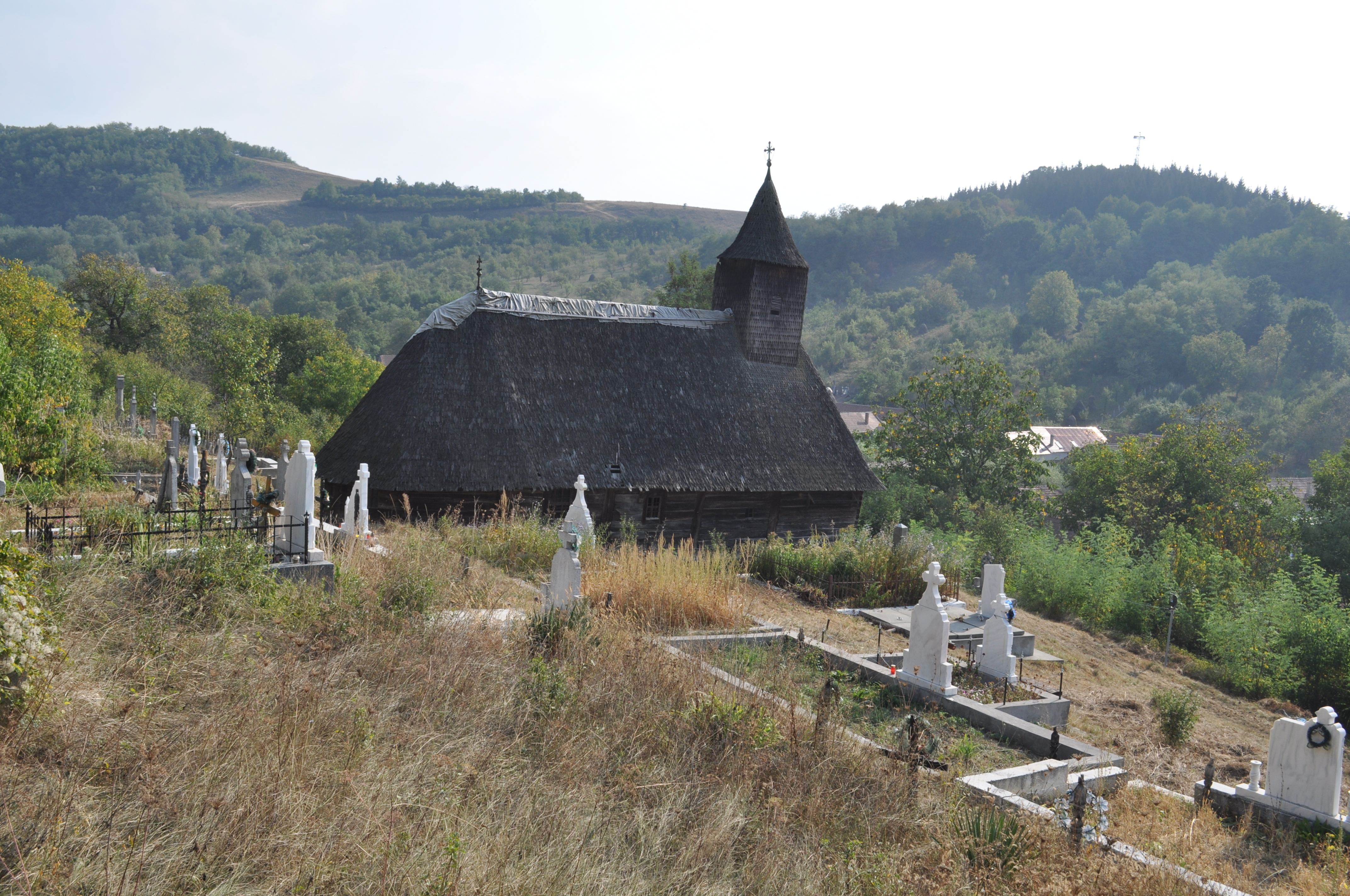 Biserica de lemn „Sfinții Arhangheli” din Săliștea, județul Alba